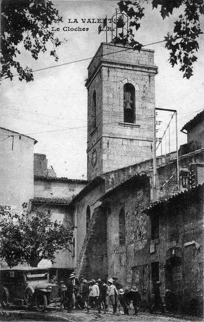 Le clocher de l'église de La Valette, Isère, France. Carte postale ancienne.